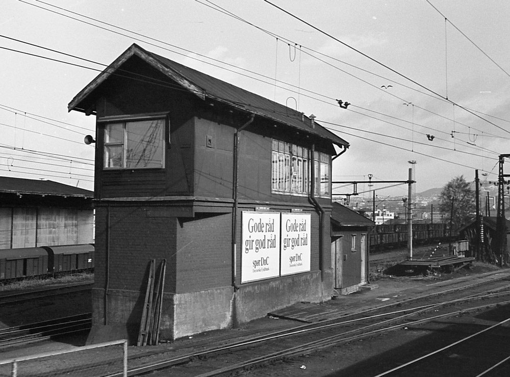 Stillverk på Loenga i Oslo 5. april 1974